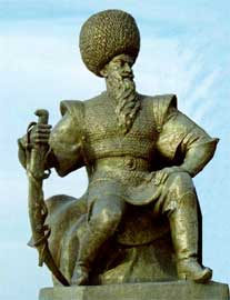 阿爾普。阿爾斯蘭的雕像（從印度維基百科獲得）